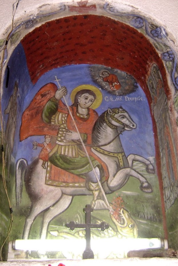 фреска над влезната врата во црквата „Св. Ѓорѓи“ во пролепско Новоселани